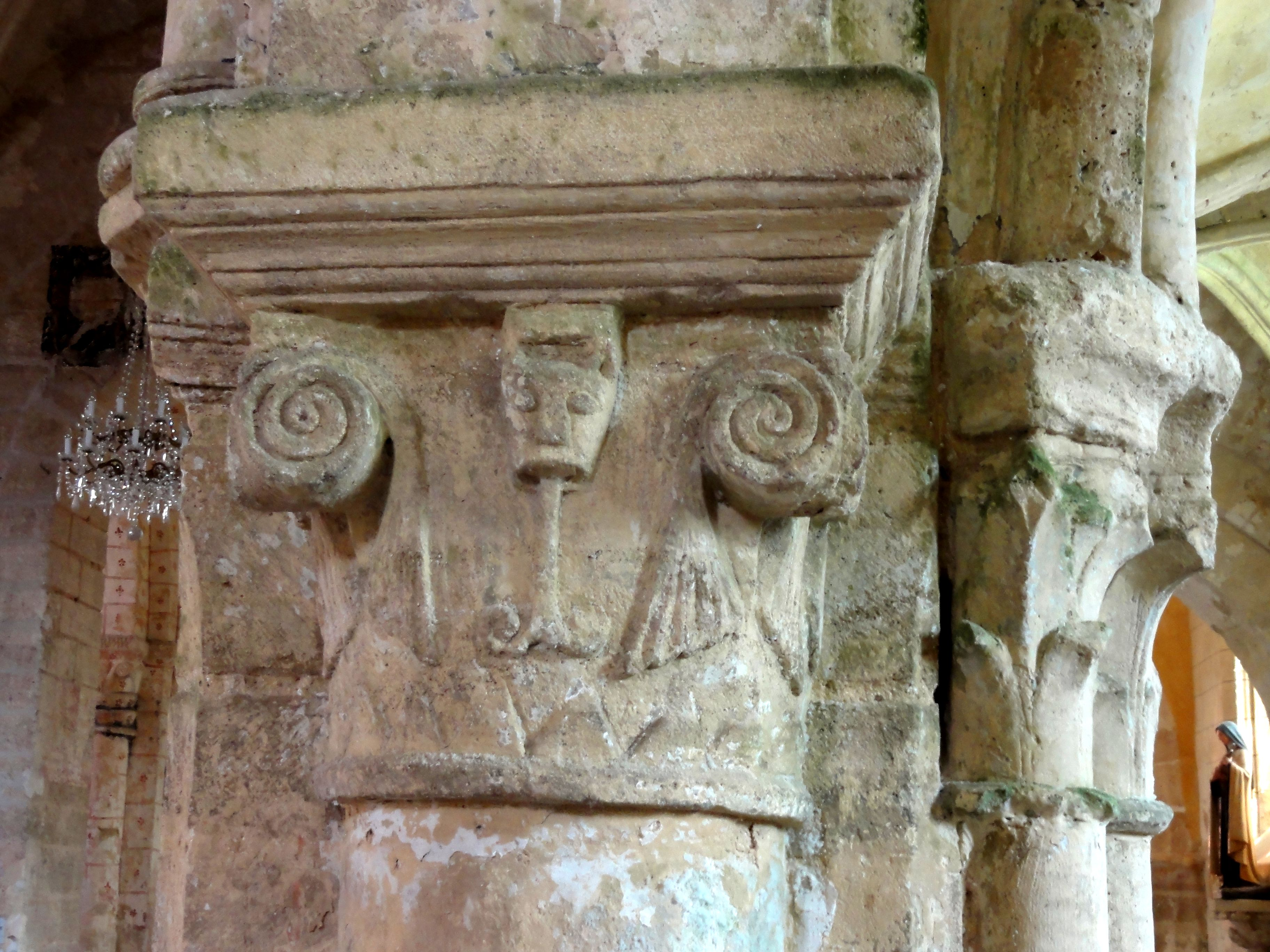 Bas-côté sud, chapiteau du troisième pilier, côté ouest.